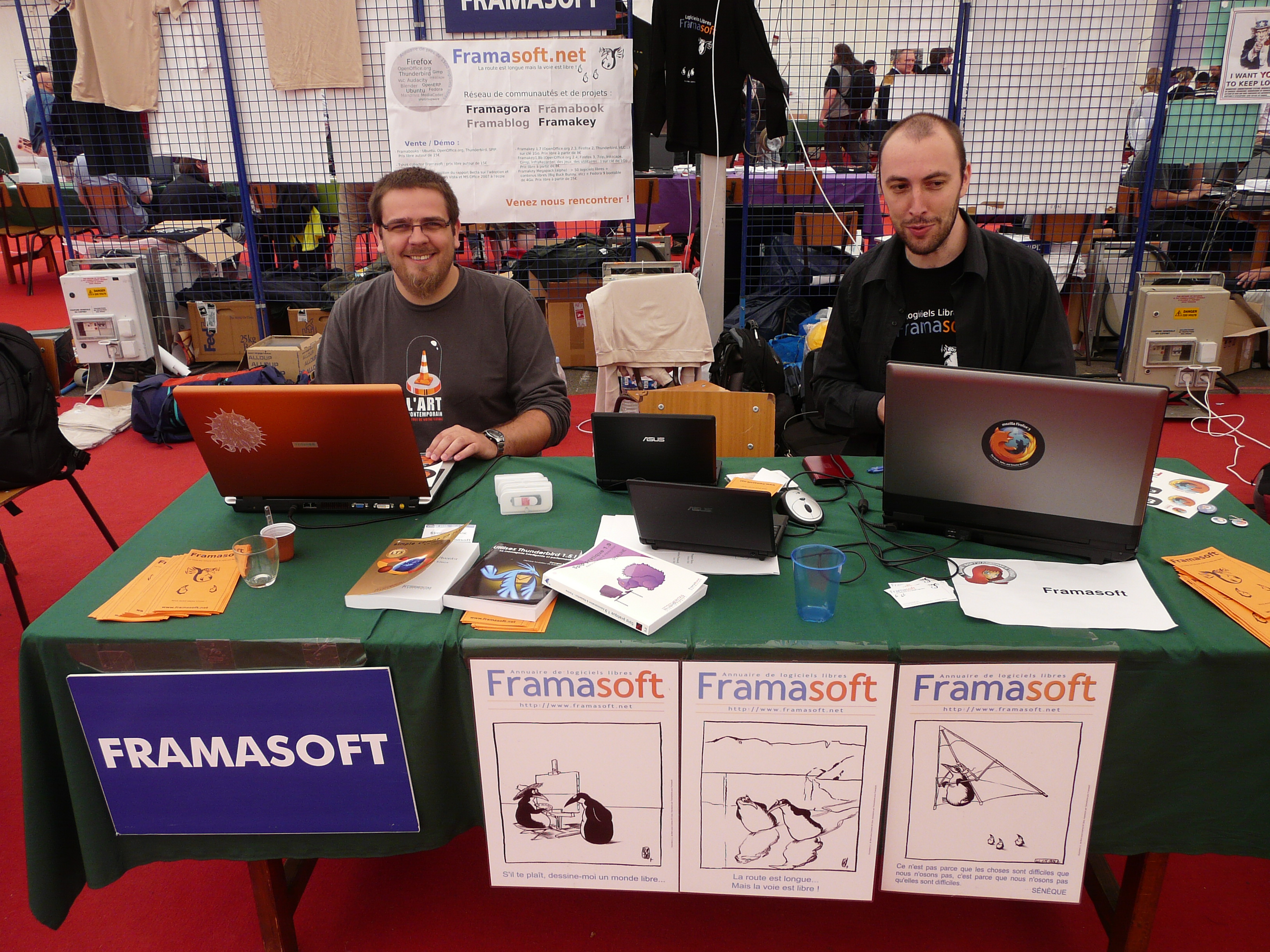 Stand Framasoft durant les Rencontres mondiales du logiciel libre 2008 de Mont-de-Marsan.